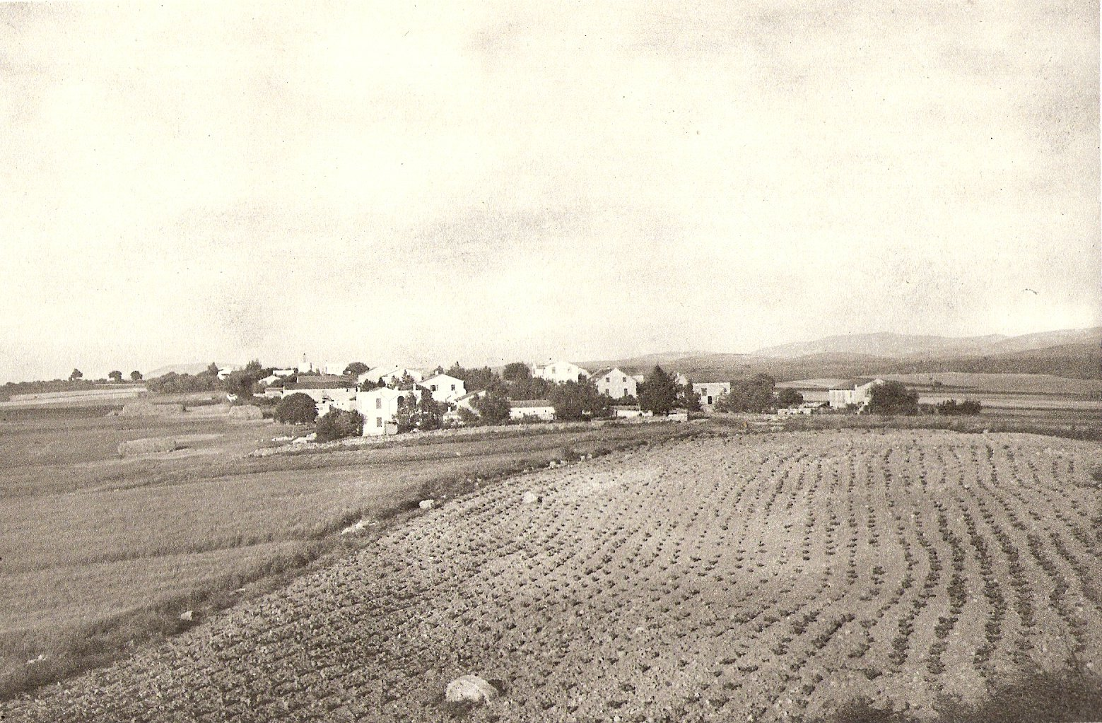 he:בית לחם הגלילית, 1925 לערך